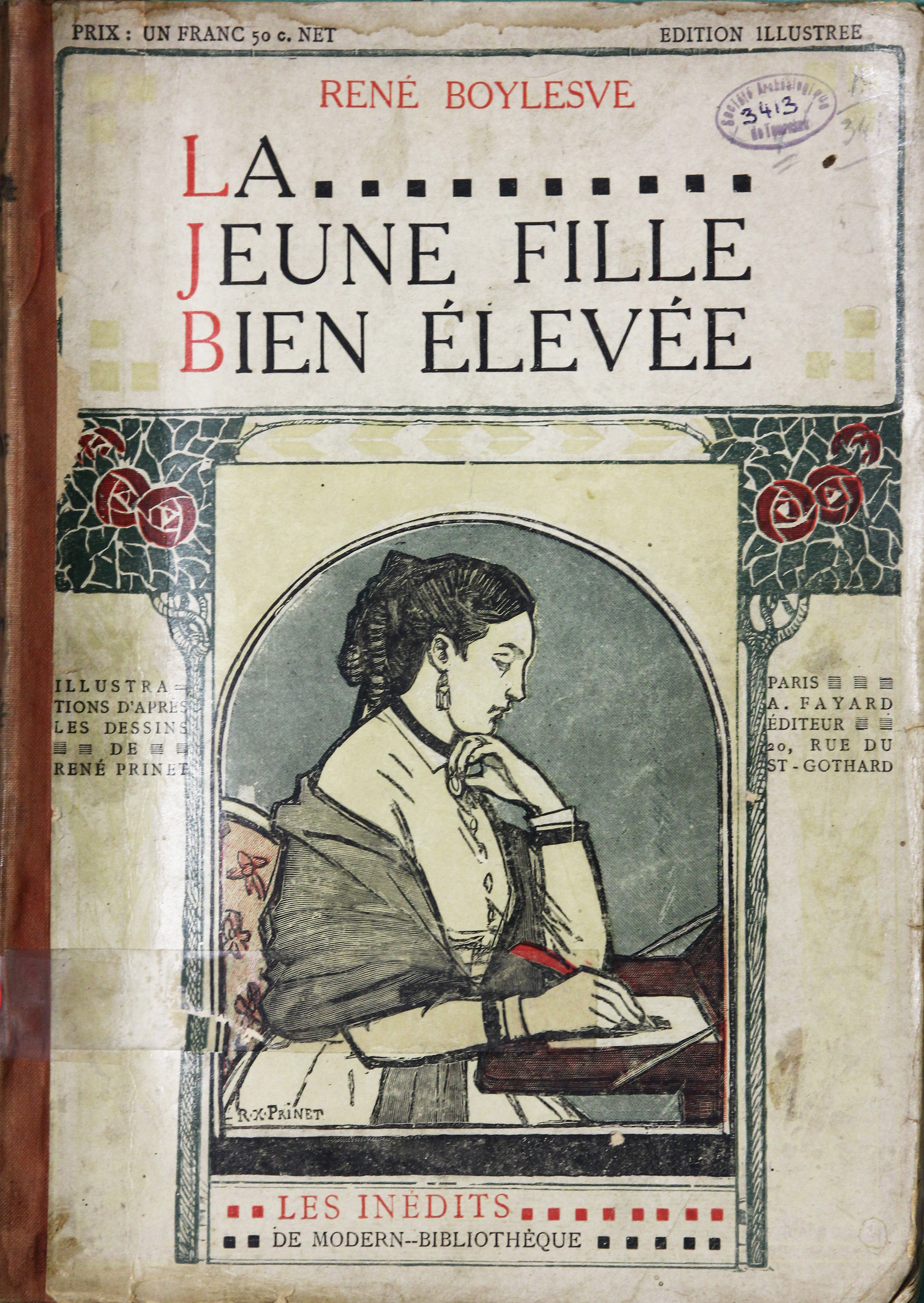 Couverture originale de l'ouvrage "La Jeune Fille bien élevée" de René Boylesve (1909)